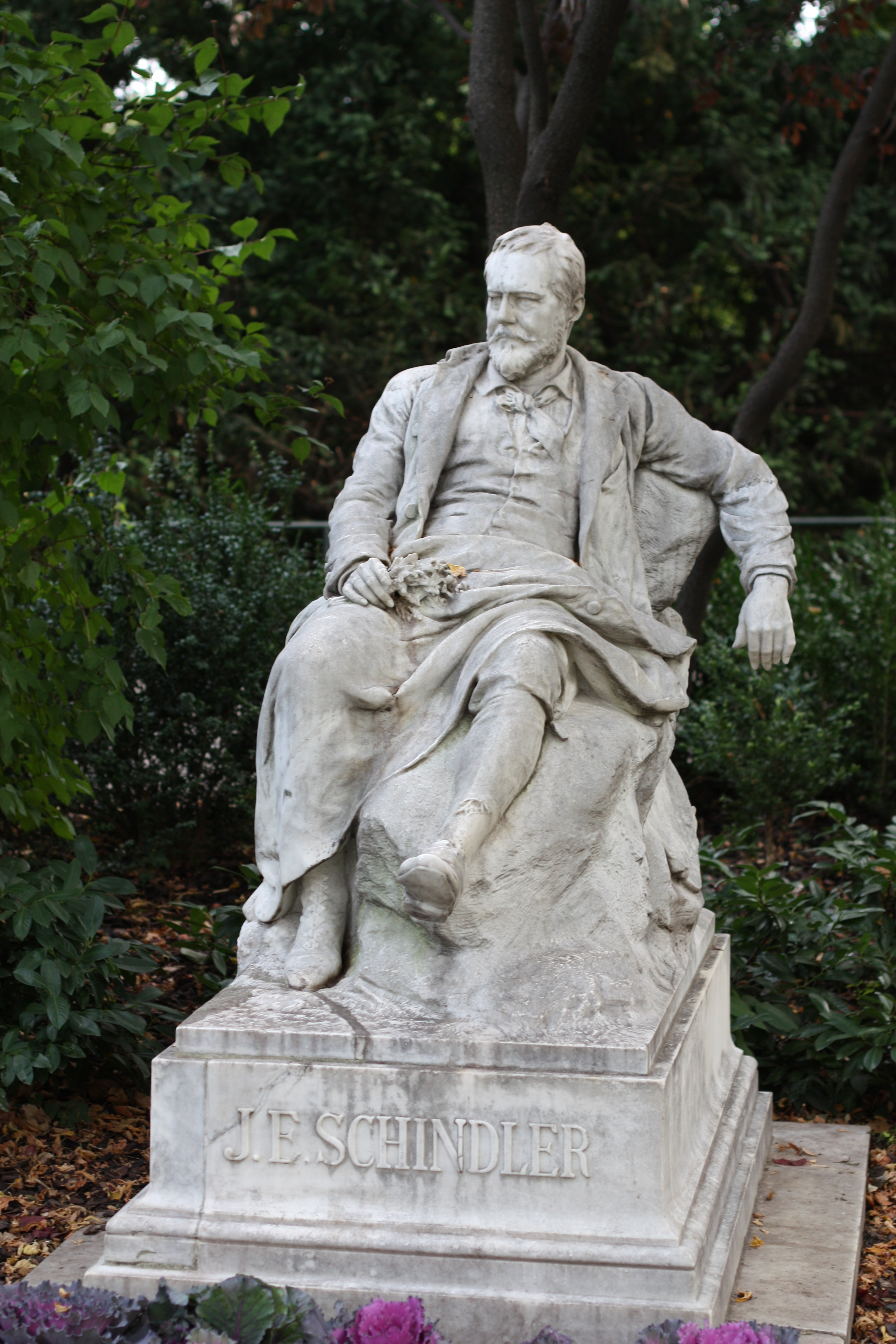 Wien, Stadtpark, Emil-Jakob-Schindler-Denkmal, von Edmund von Hellmer, 1895.